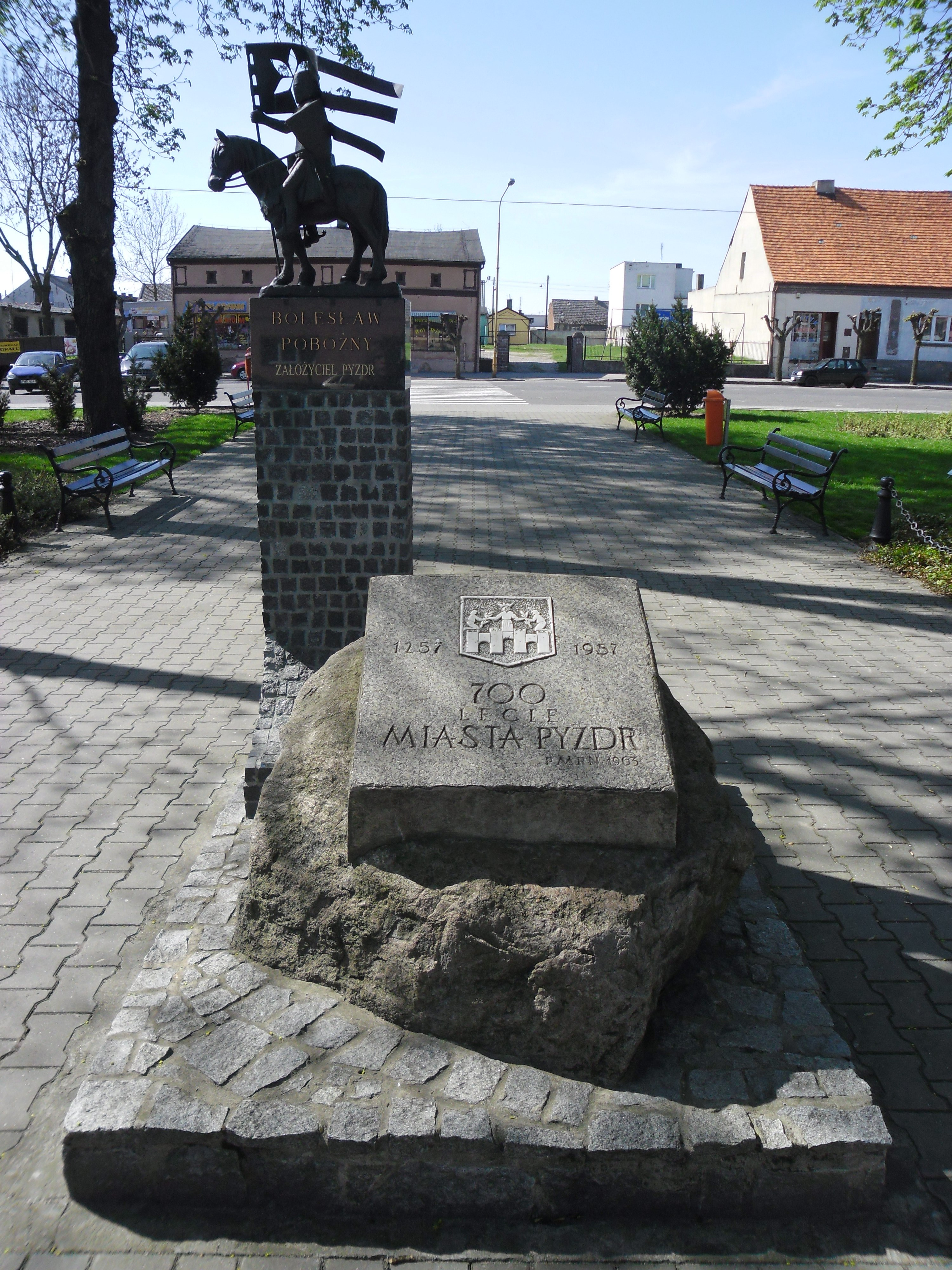 Pomnik z okazji 700-lecia miasta Pyzdr z wygrawerowanym napisem, oraz umieszczonym herbem miasta. Powstał w 1957r.